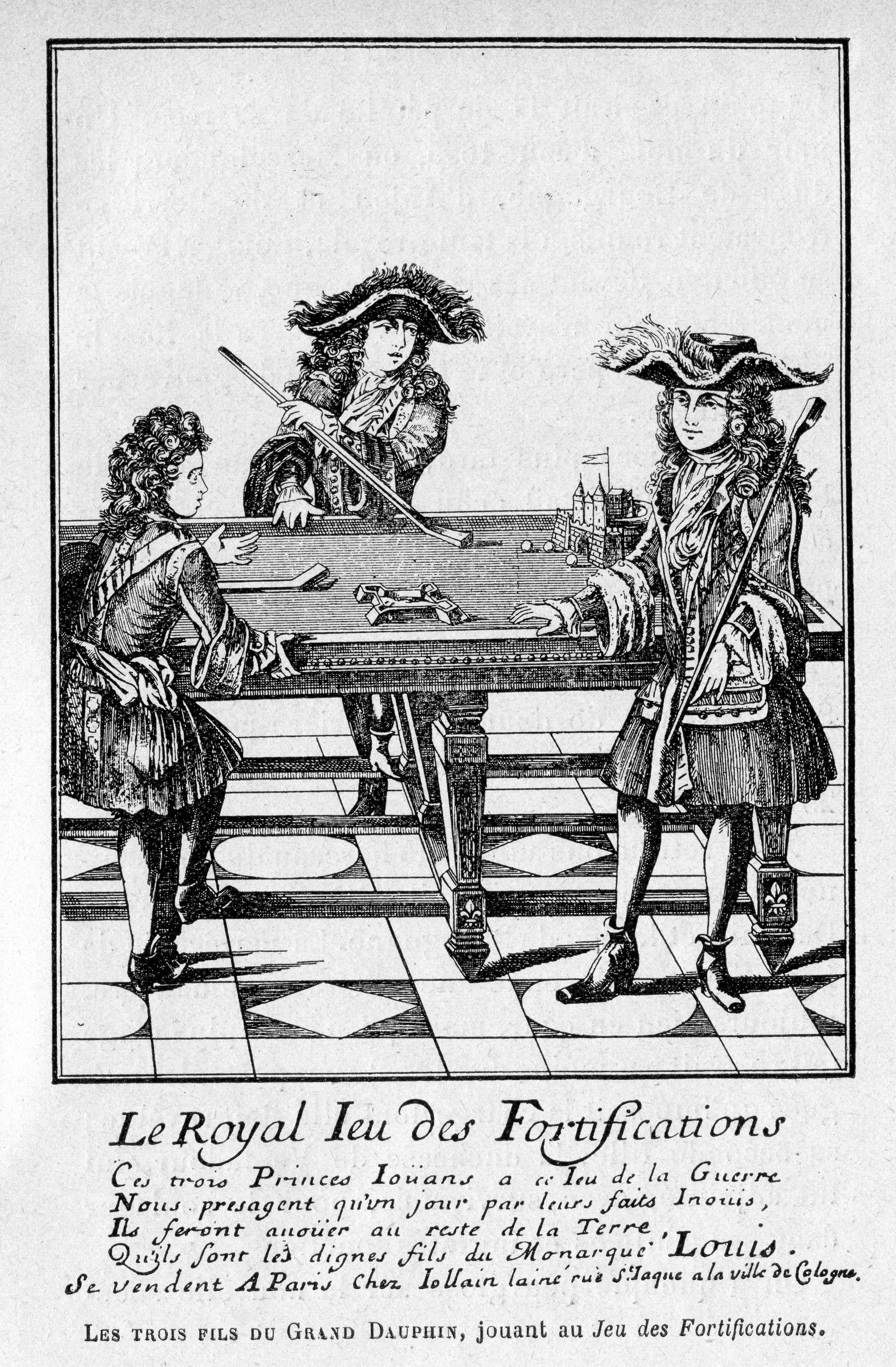 Cabanès, Éducation de Princes031 Les trois fils du Grand Dauphin, jouant au Jeu des Fortifications